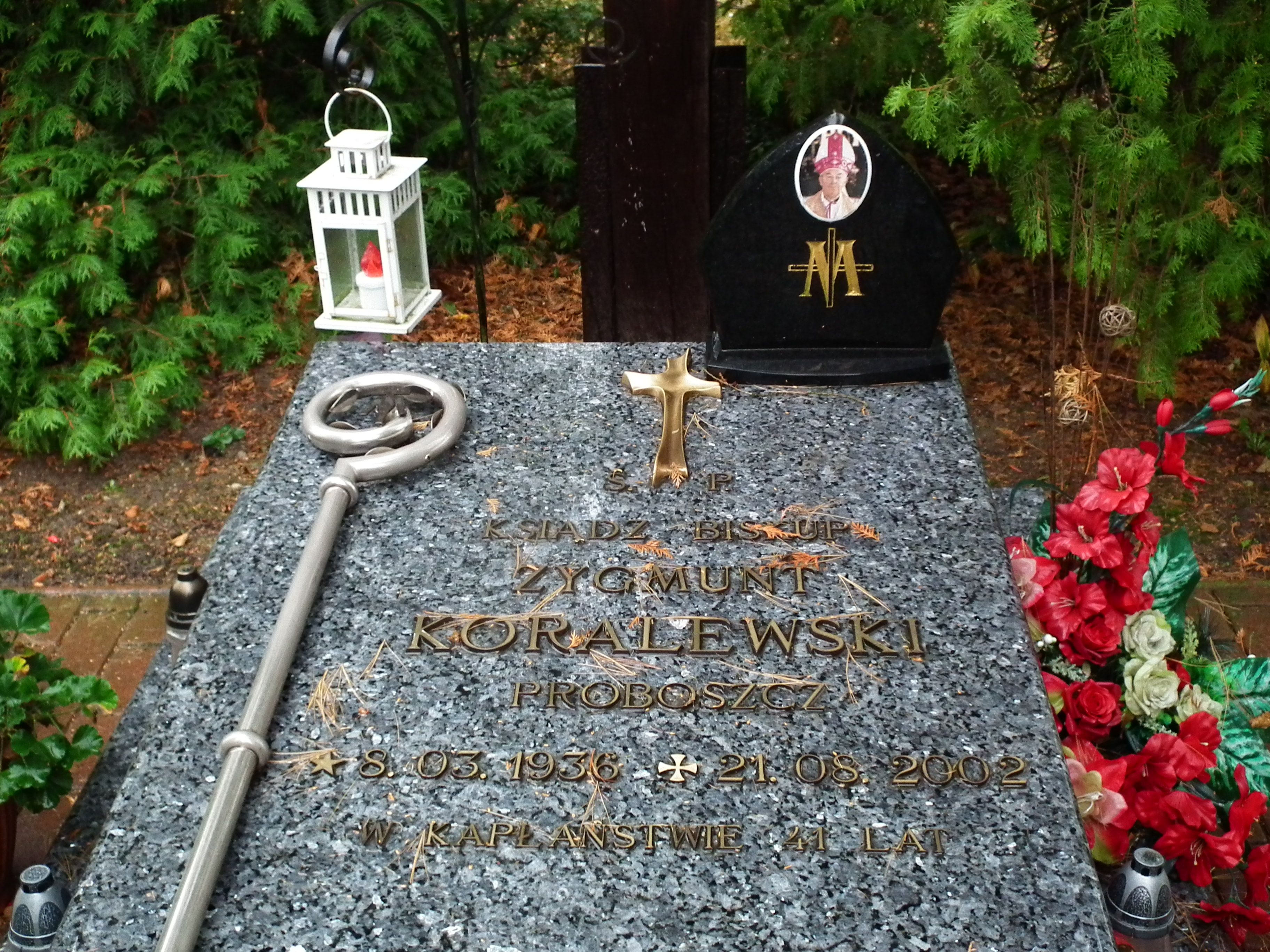 Katedra Polskokatolicka w Kotłowie.